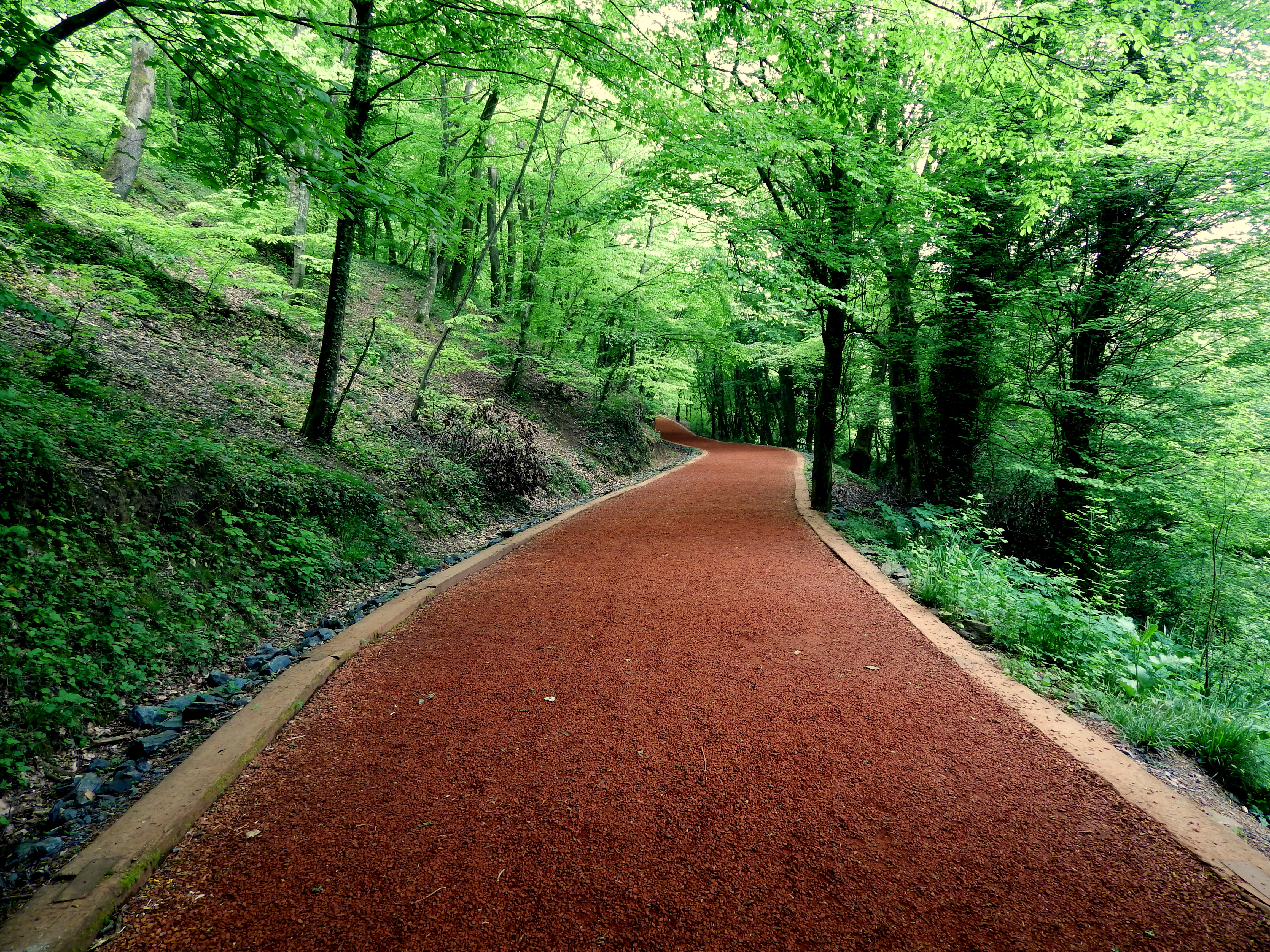 Belgrad Ormanı...